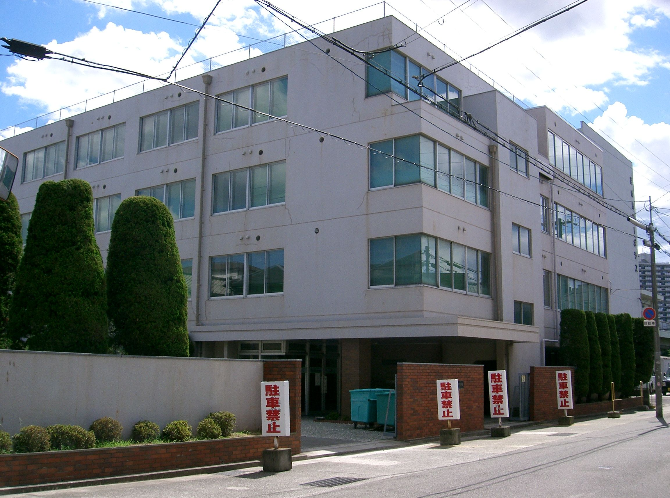 清恵会医療専門学院